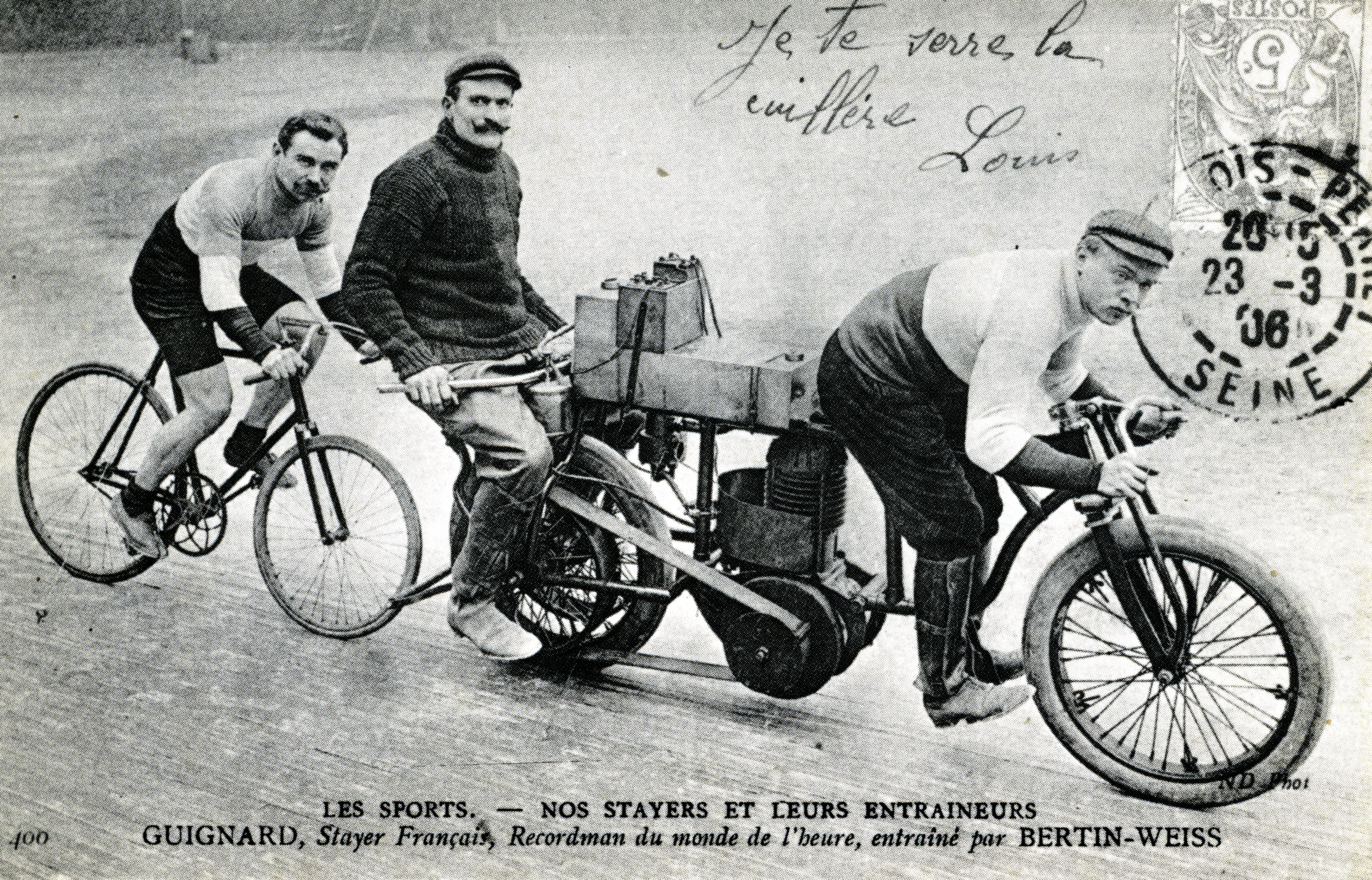 Photo de 1906 avec GUIGNARD, stayer, recordman du monde de l'heure, et ses entraîneurs BERTIN-WEISS